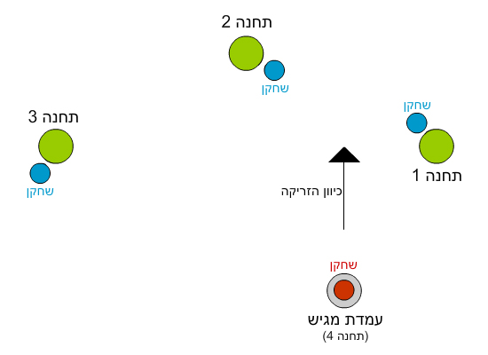 זירת המשחק